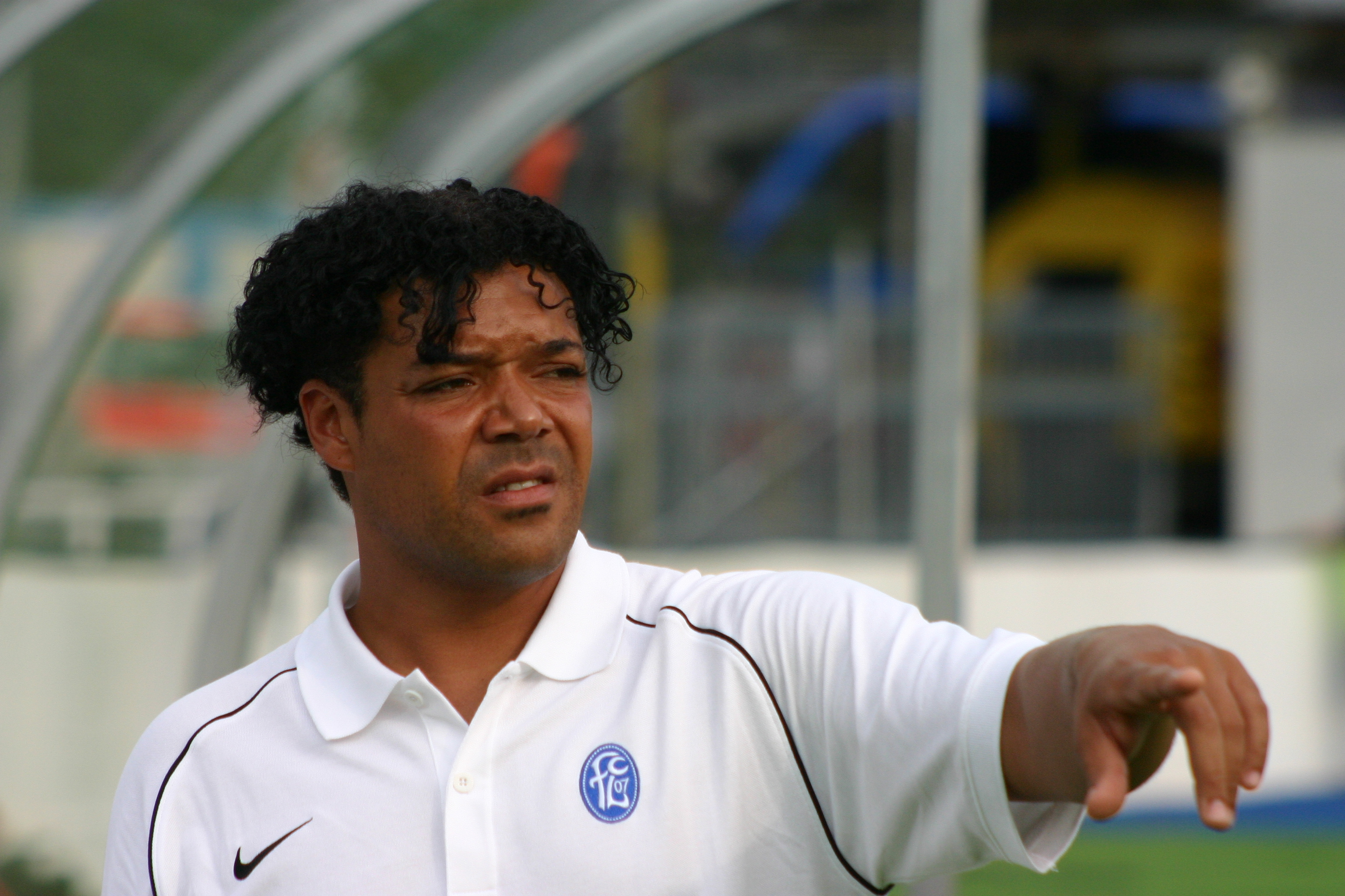 Eric Orie Fußballtrainer